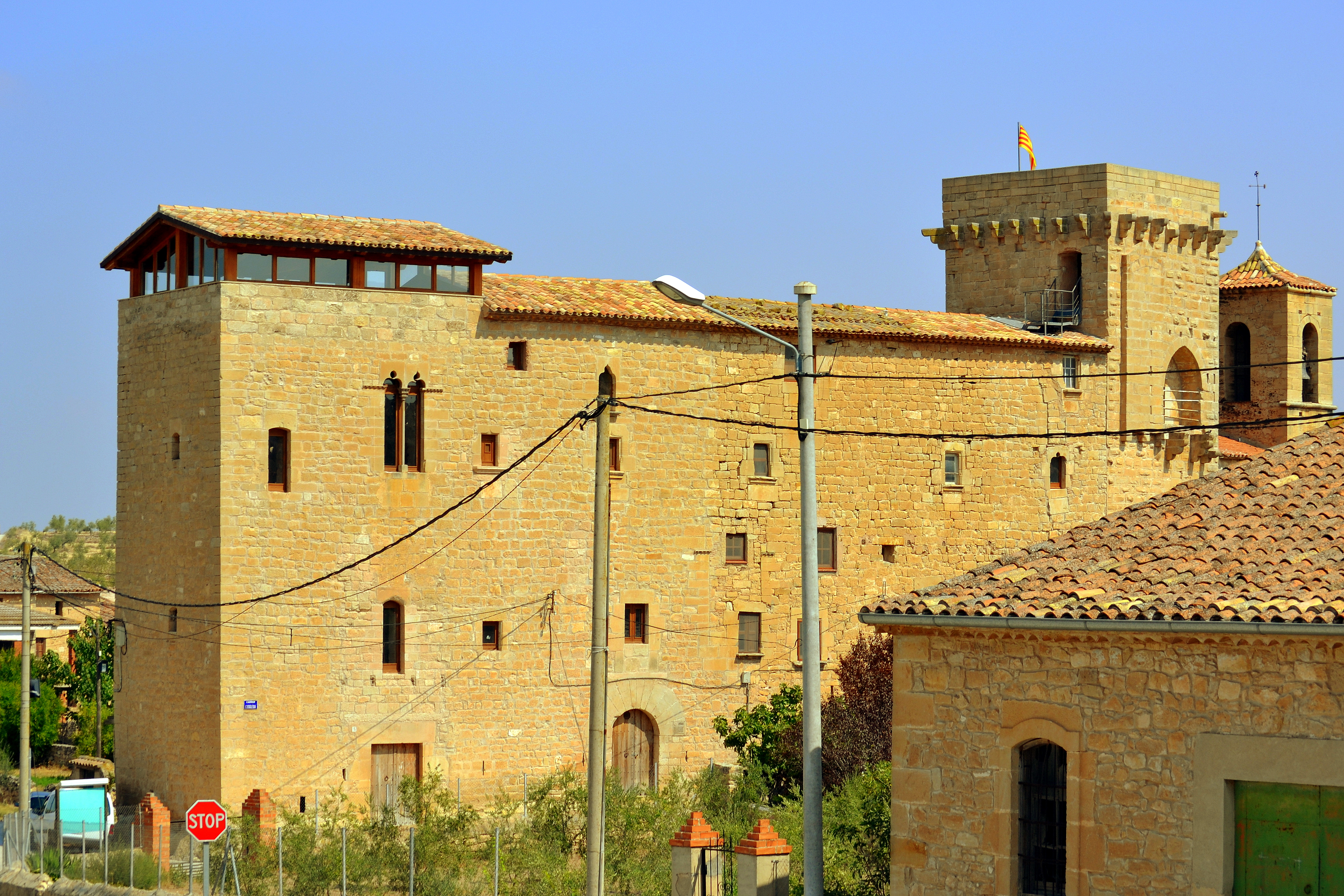 Castell de la Floresta